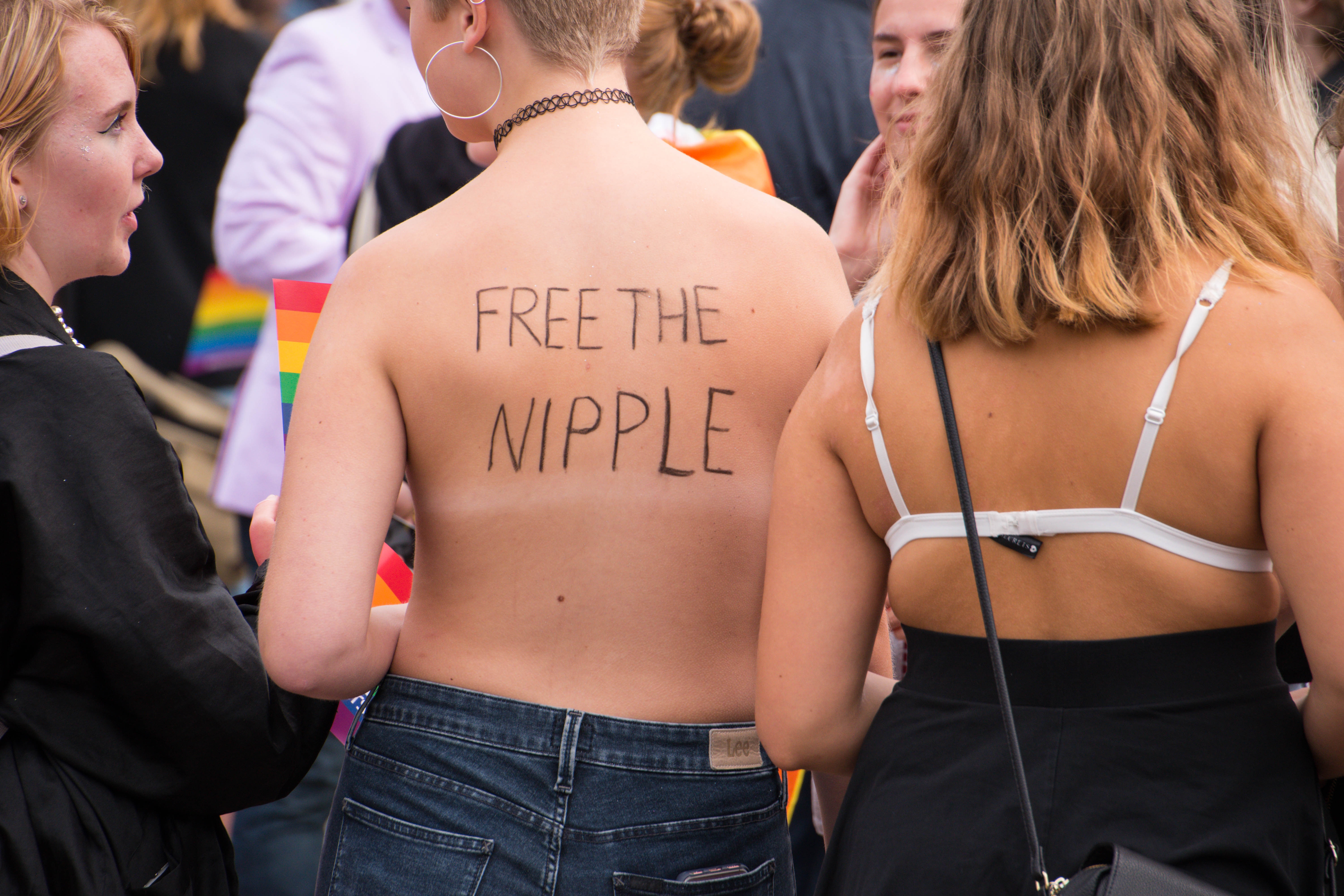 Malmö Pride 2016, Malmö, Sweden